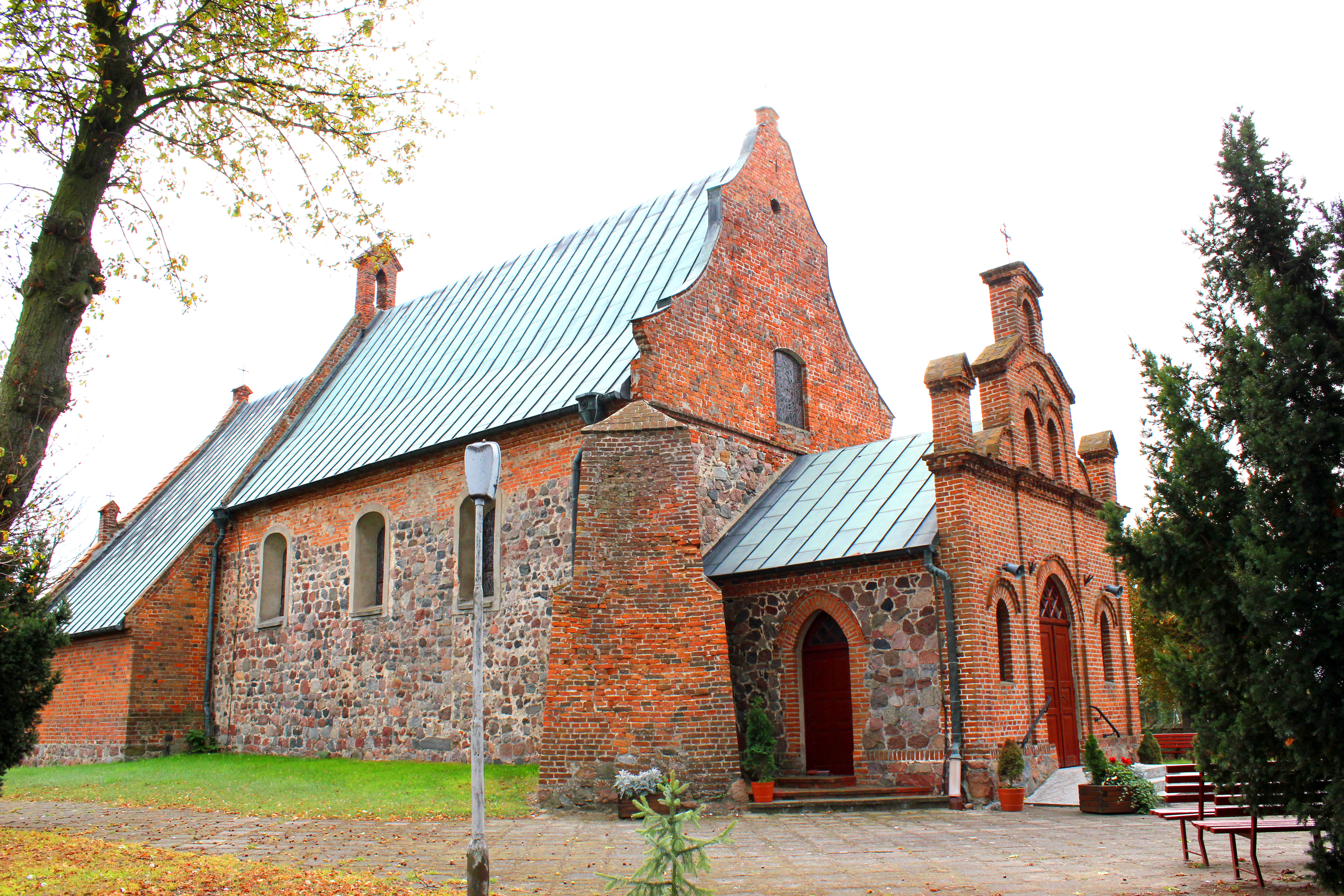 Kościelna Wieś - kościół parafialny p.w. św. Wawrzyńca, poł. XII, XV, XVIII w.